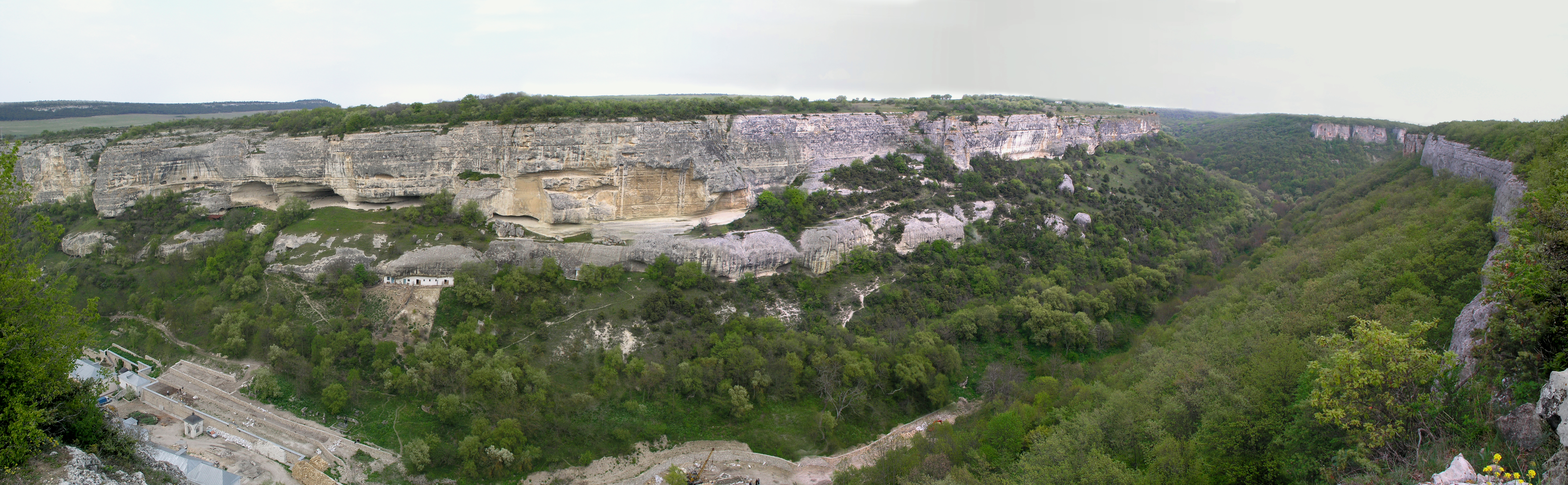 Украина, Крым, Бахчисарайский район. Панорама ущелья Марьям-Дере